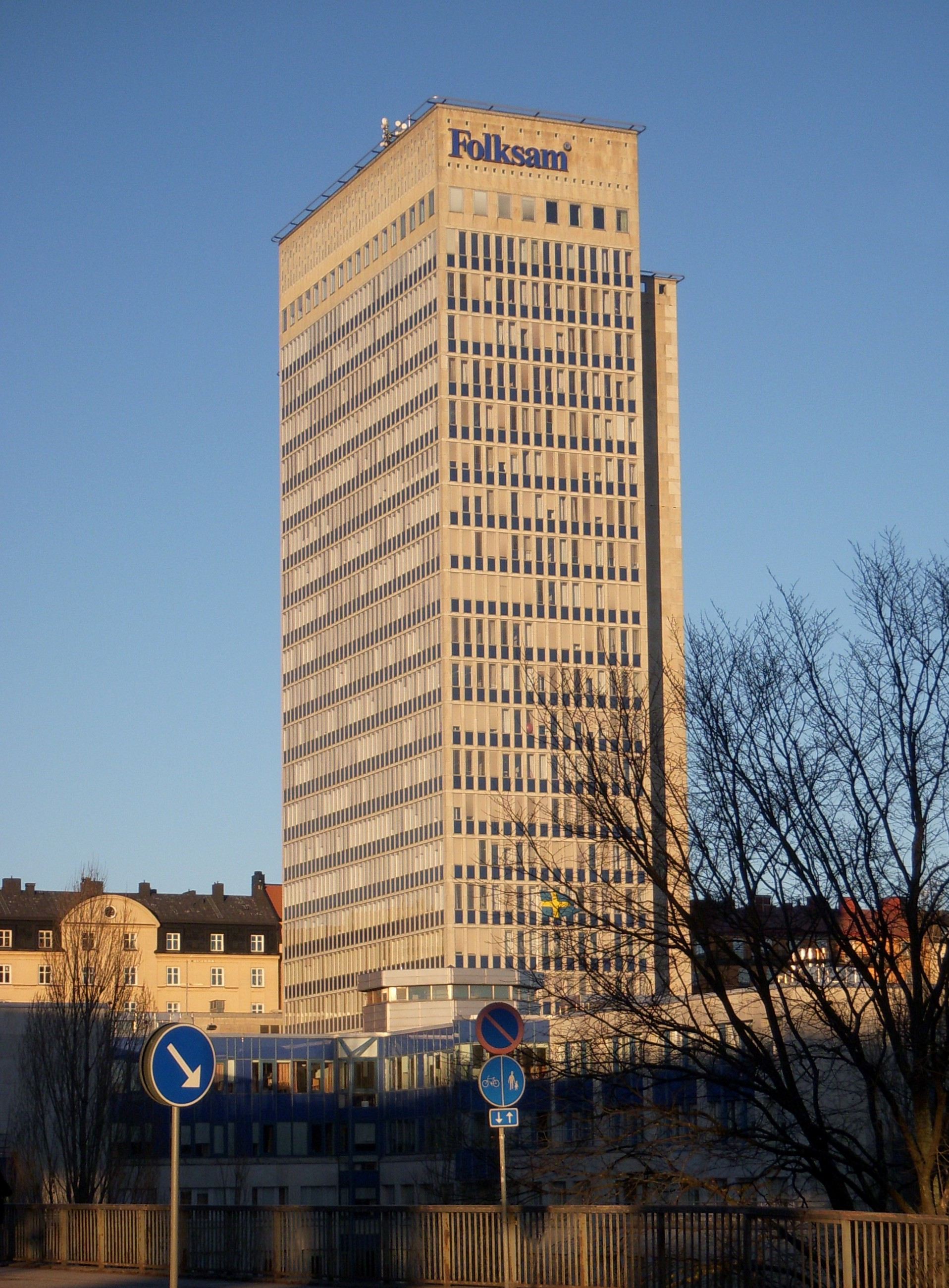 Folksamhuset på Södermalm i Stockholm